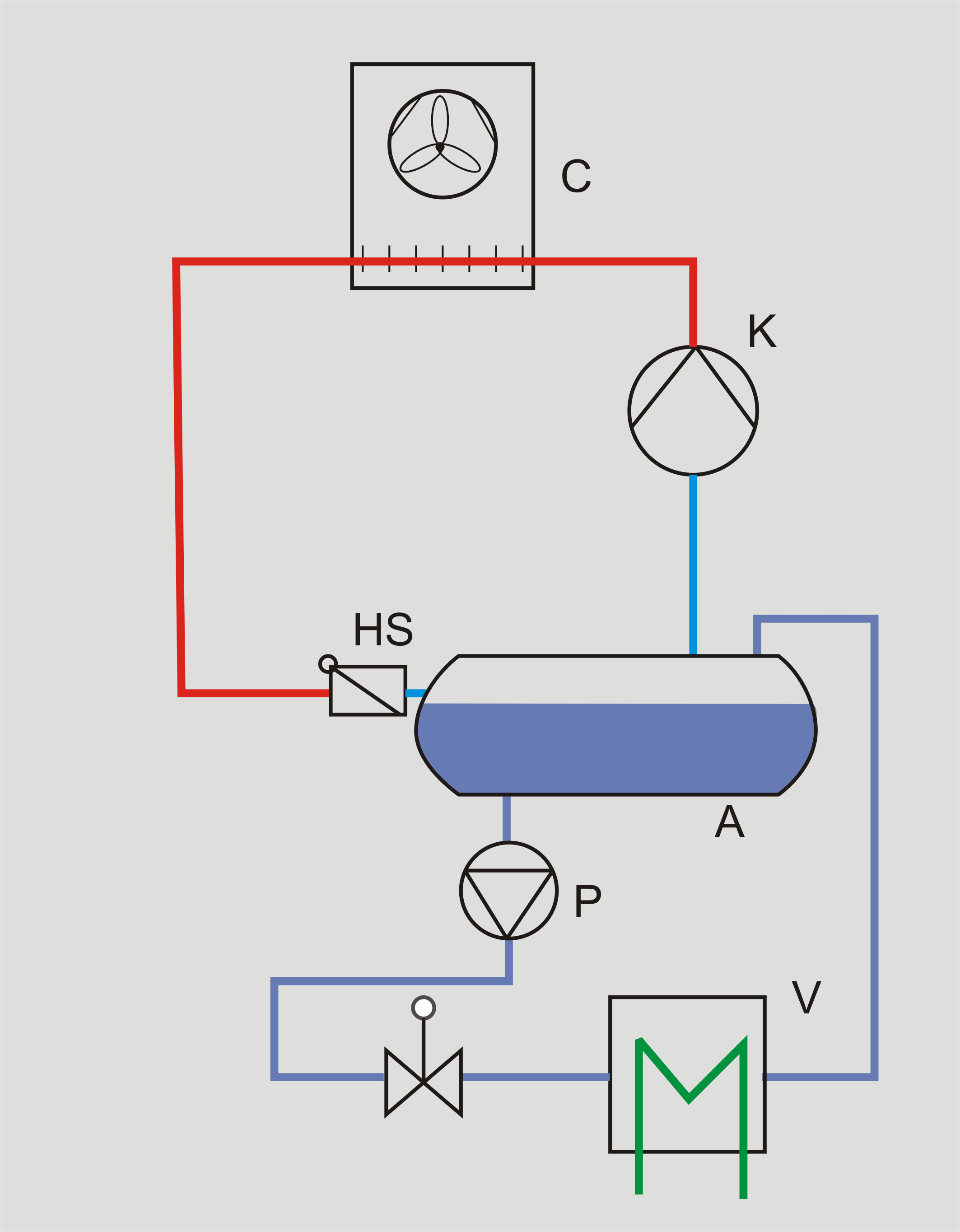 Kälteanlage ausgelegt als Pumpenanlage